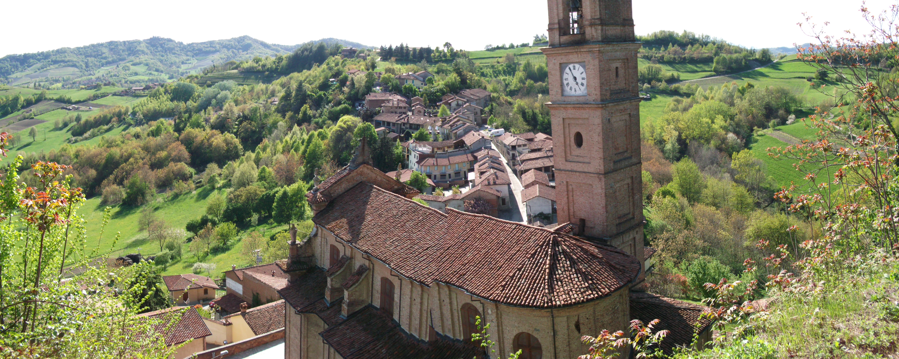 Comune di Aramengo, Asti (Italia)